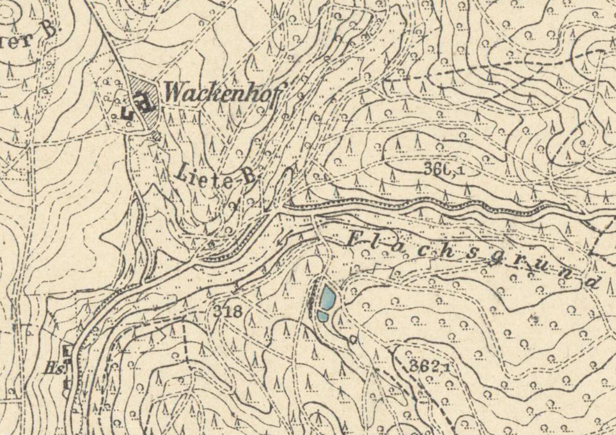 Wackenhof, Gemeinde Moorgrund, Wartburgkreis, Thüringen, Ausschnitt aus der Topographischen Karte 1:25000 Bad Salzungen 5127 von 1919